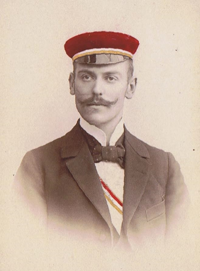 Porträtfotografie von Julius Schlinck